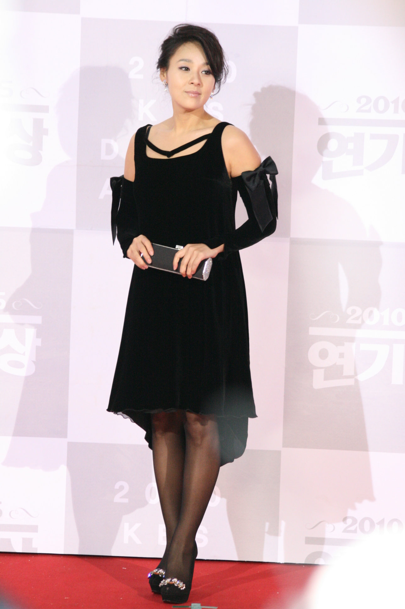 2010 KBS 연기대상